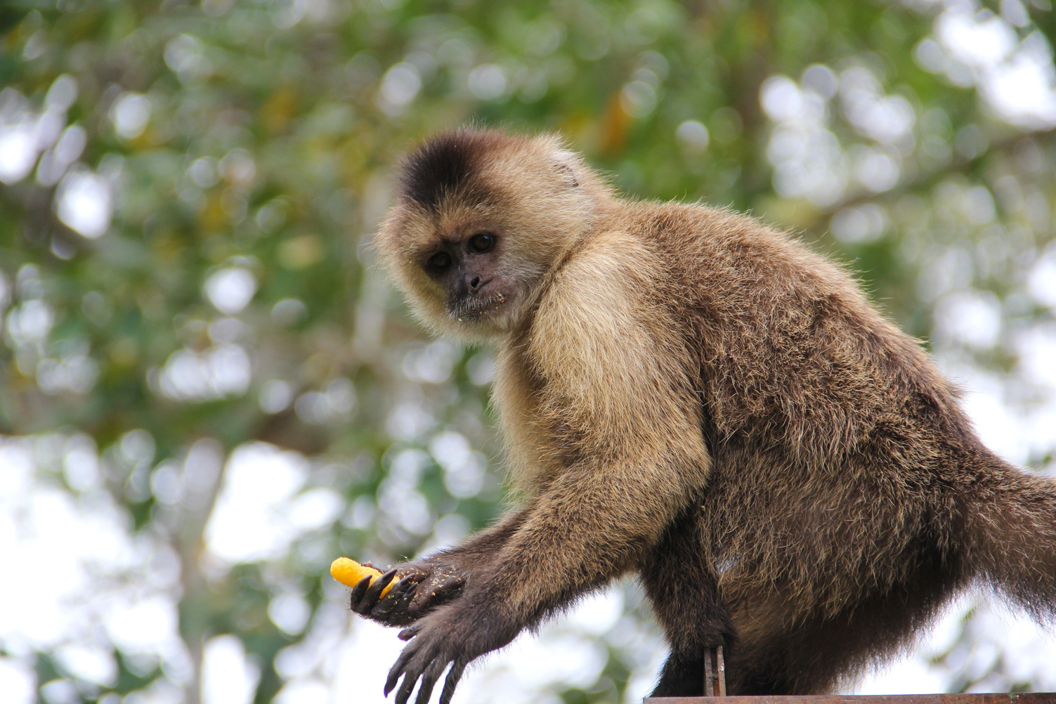 Mono capuchino comiendo Pepito (zoológico Loefling - Pto Ordáz - Bolivar)